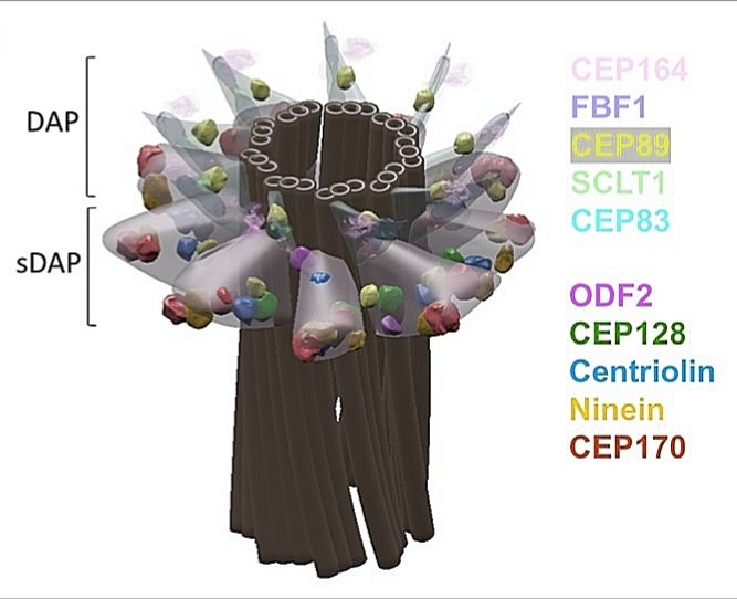 Fig. 3_ Arquitectura molecular 3D del DAP y del sDAP. d) Vista lateral del modelo. e) Vista cercana del sDAP y el DAP. ODF2 se localiza en ambos extremos del sDAP y cerca de la pared del centríolo; CEP89 se localiza en el DAP así como en la región sDAP.